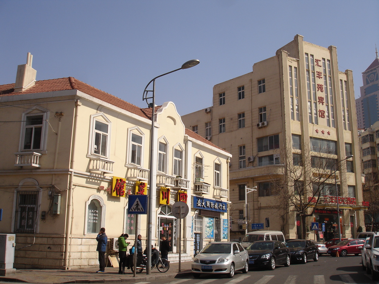 青岛市物品证券交易所旧址